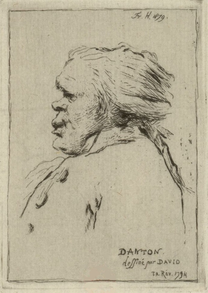 Caricature de Danton. Gravure à l'eau-forte de Frédéric-Désiré Hillemacher (1879) d'après un portrait dessiné par David en 1794.